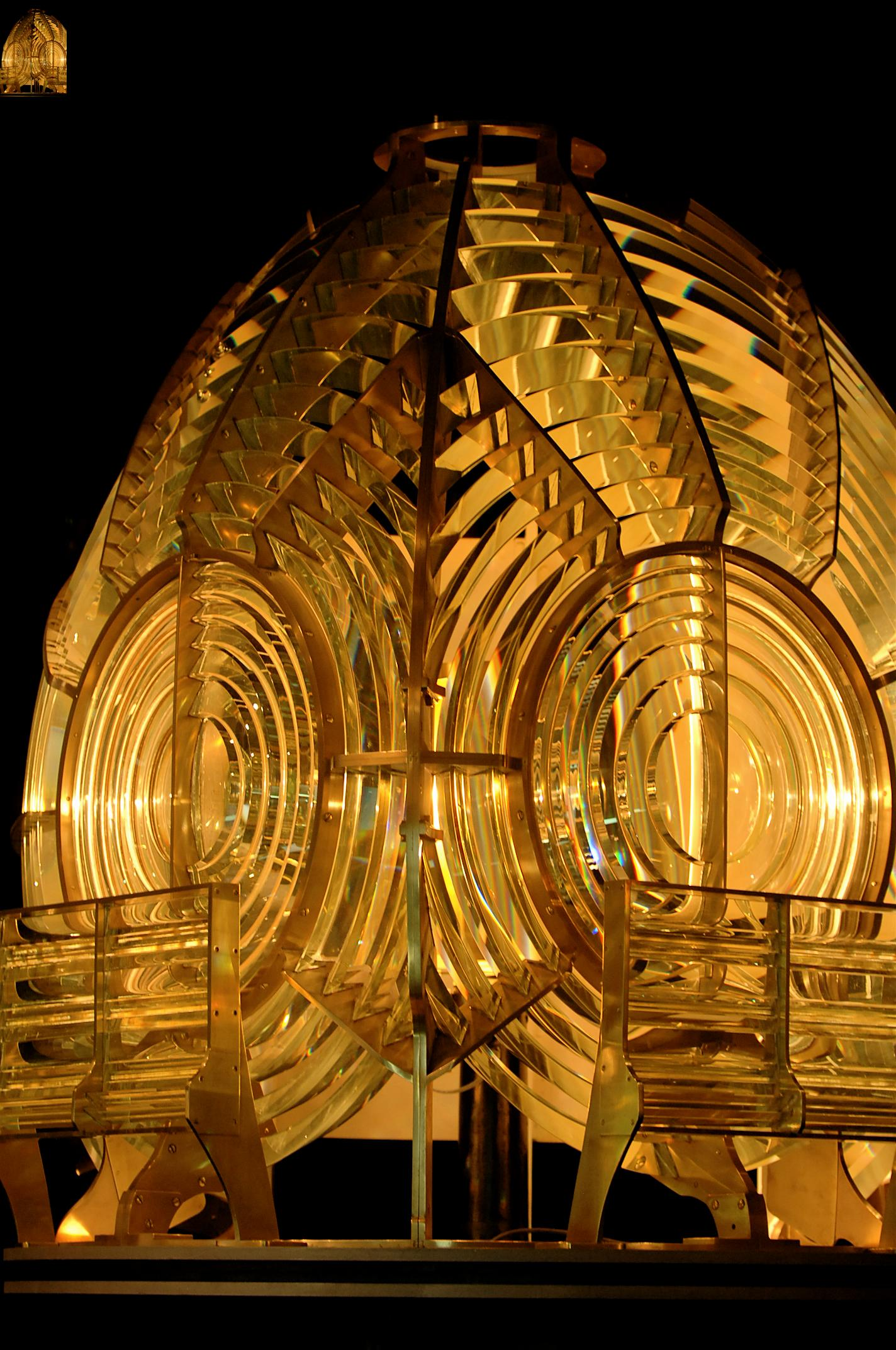 Fresnel lenses at Santa Marta's Nautical Museum, Cascais, Portugal